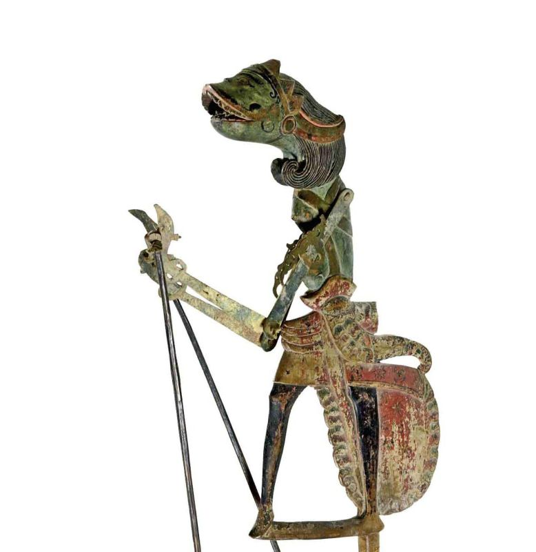 Wajangpop. Wajangpop, demonenfiguur met wijd openstaande bek en grote tanden Unknown language: Wayang klitik Menak Jingga Wayang krucil